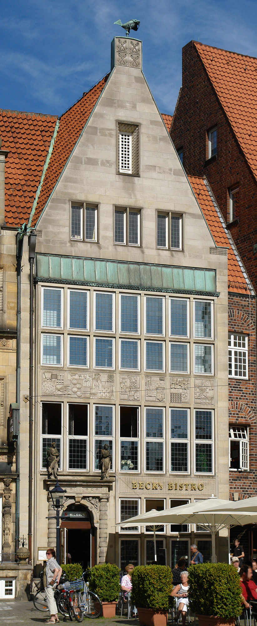 Zum Jonas, C. H. F. Kaune's Restauration, Haus am Markt, Beck's am Markt in Bremen, Am Markt 9.Das abgebildete Objekt ist ein geschütztes Kulturdenkmal in der Freien Hansestadt Bremen, mit der Nr. 0069,T beim Landesamt für Denkmalpflege registriert.